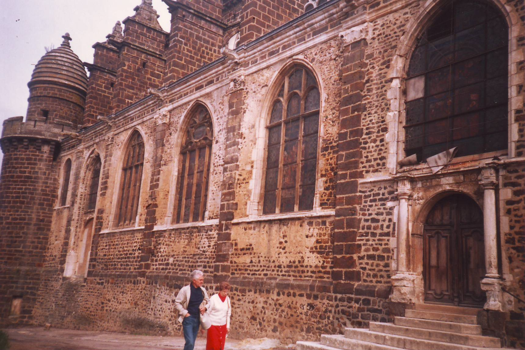 Portail église toucy